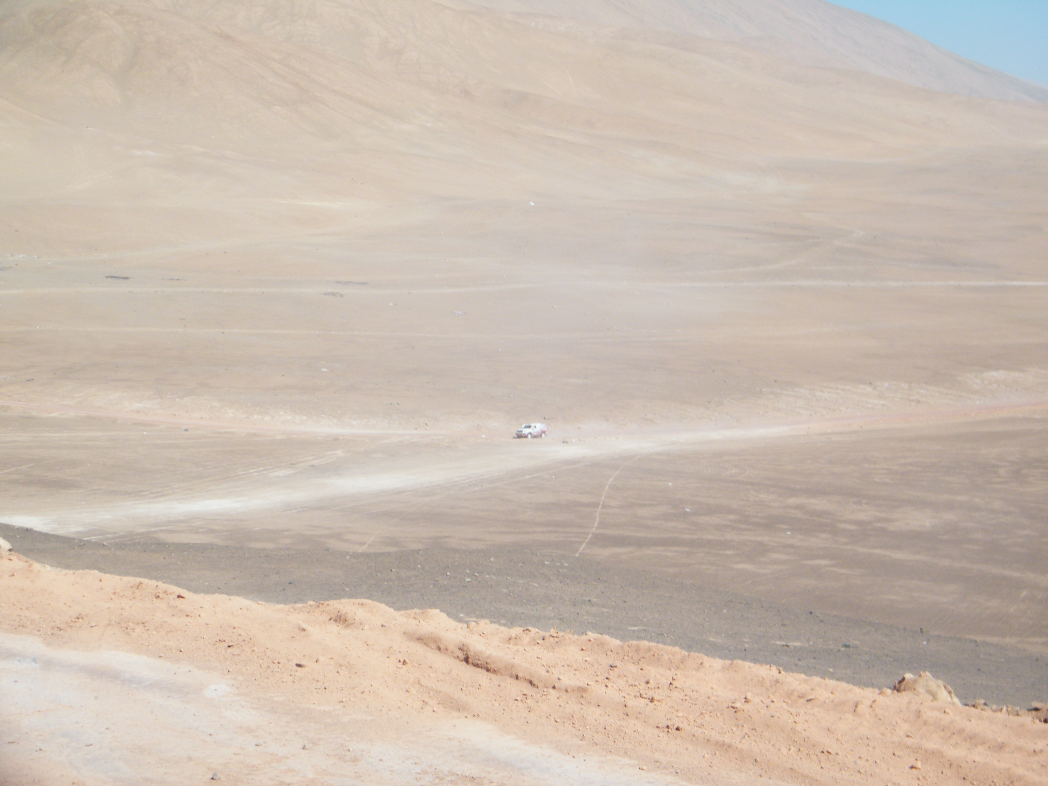 dakar 2011